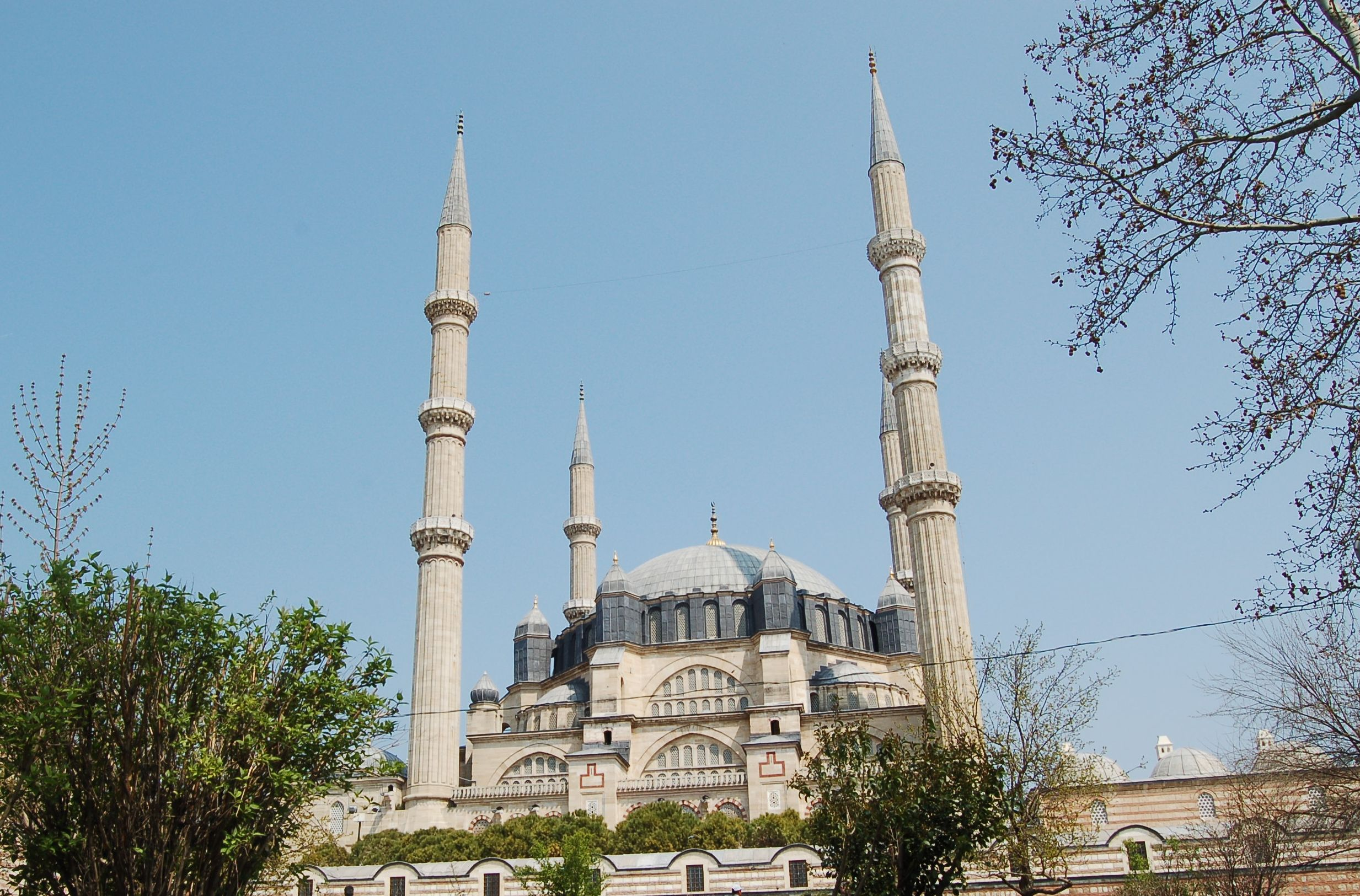 Τζαμί Ανδριανούπολης